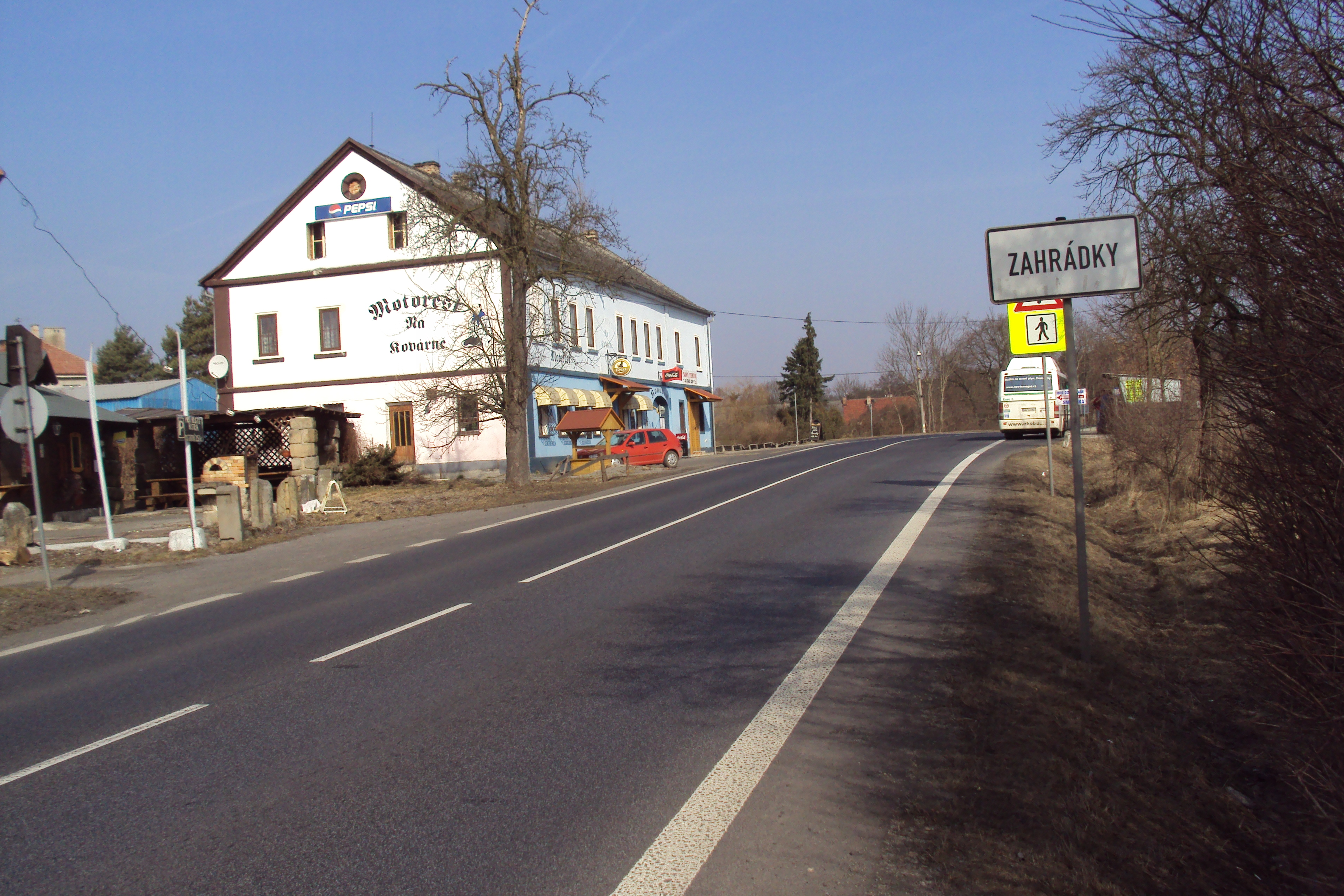 U křižovatky silnic v Zahrádkách na Českolipsku